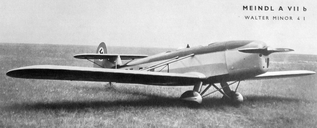 letecký motor Walter Minor 4 I a letoun Meindl A.VII b (1935)